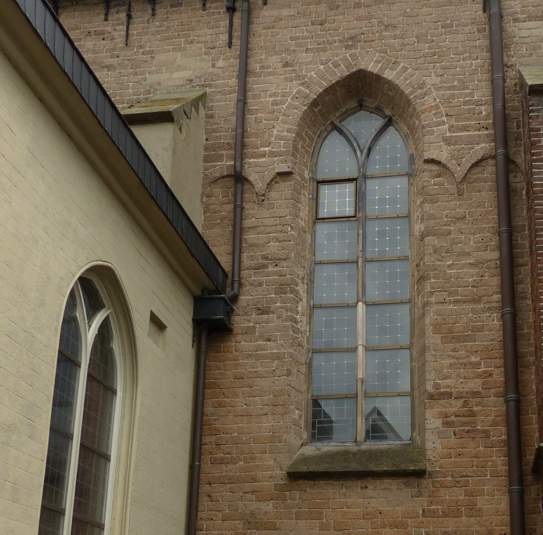 Rijssen, Schildkerk, noordmuur met rondboogfriezen (12e eeuw)